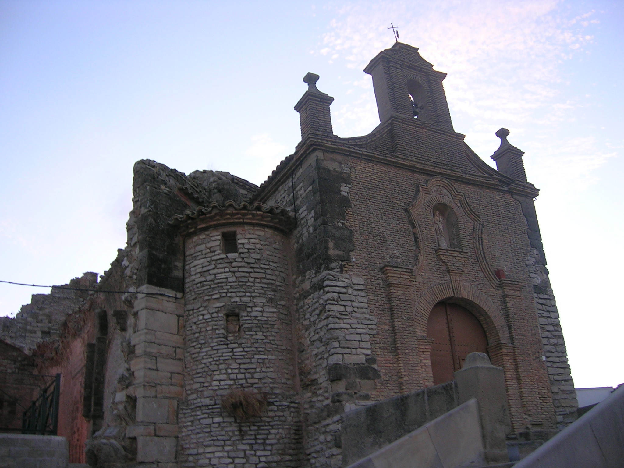 Ermita de La Virgen de la Corona em Almudévar, Espanha (Spain). Tirada por Sérgio Gomes.